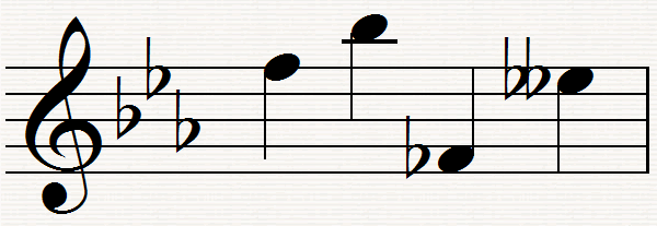 Bémol en armure et sur notes accidentés. copie d'écran éditeur de partitions Sibelius.